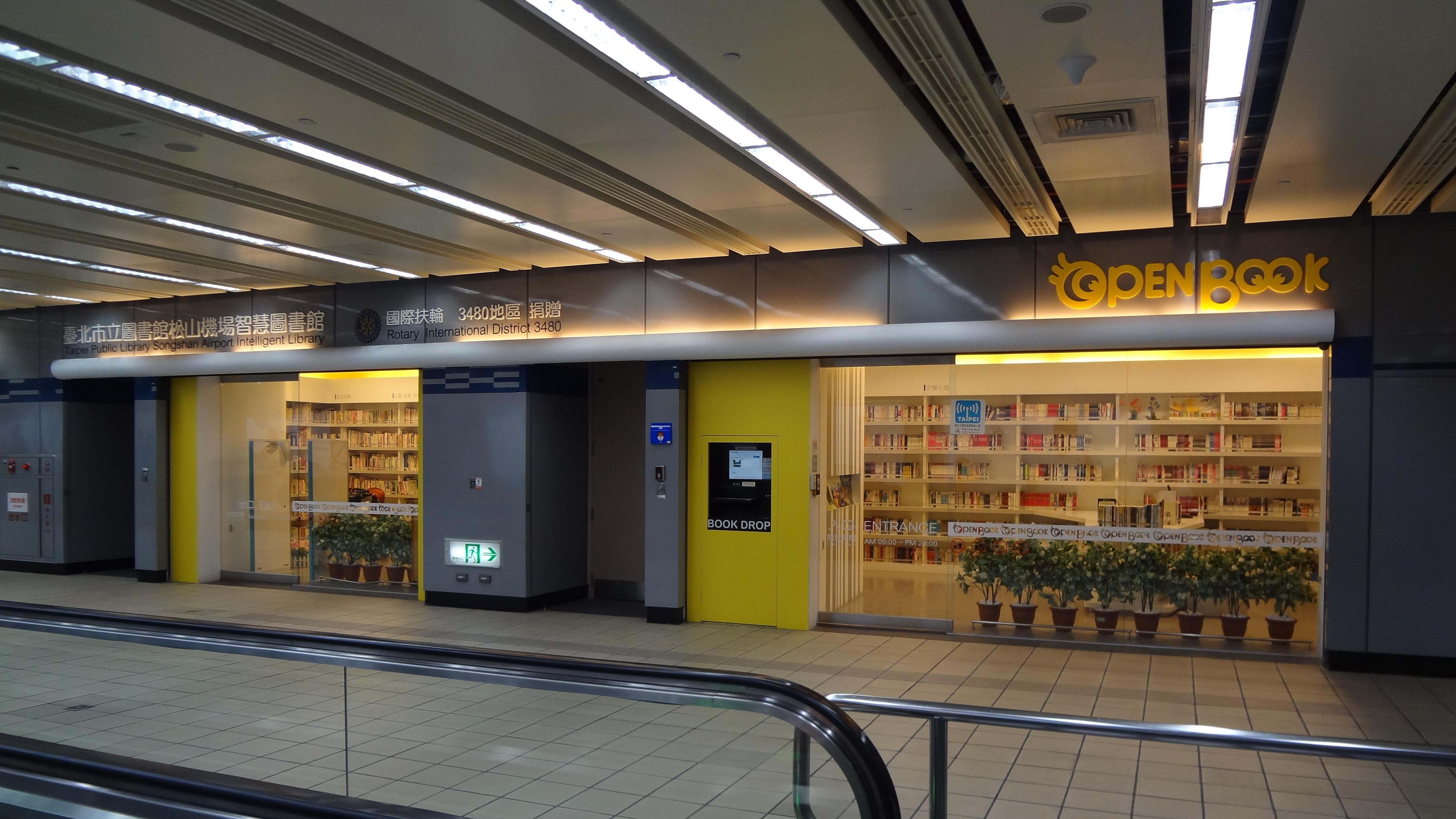 臺北市立圖書館松山機場智慧圖書館。